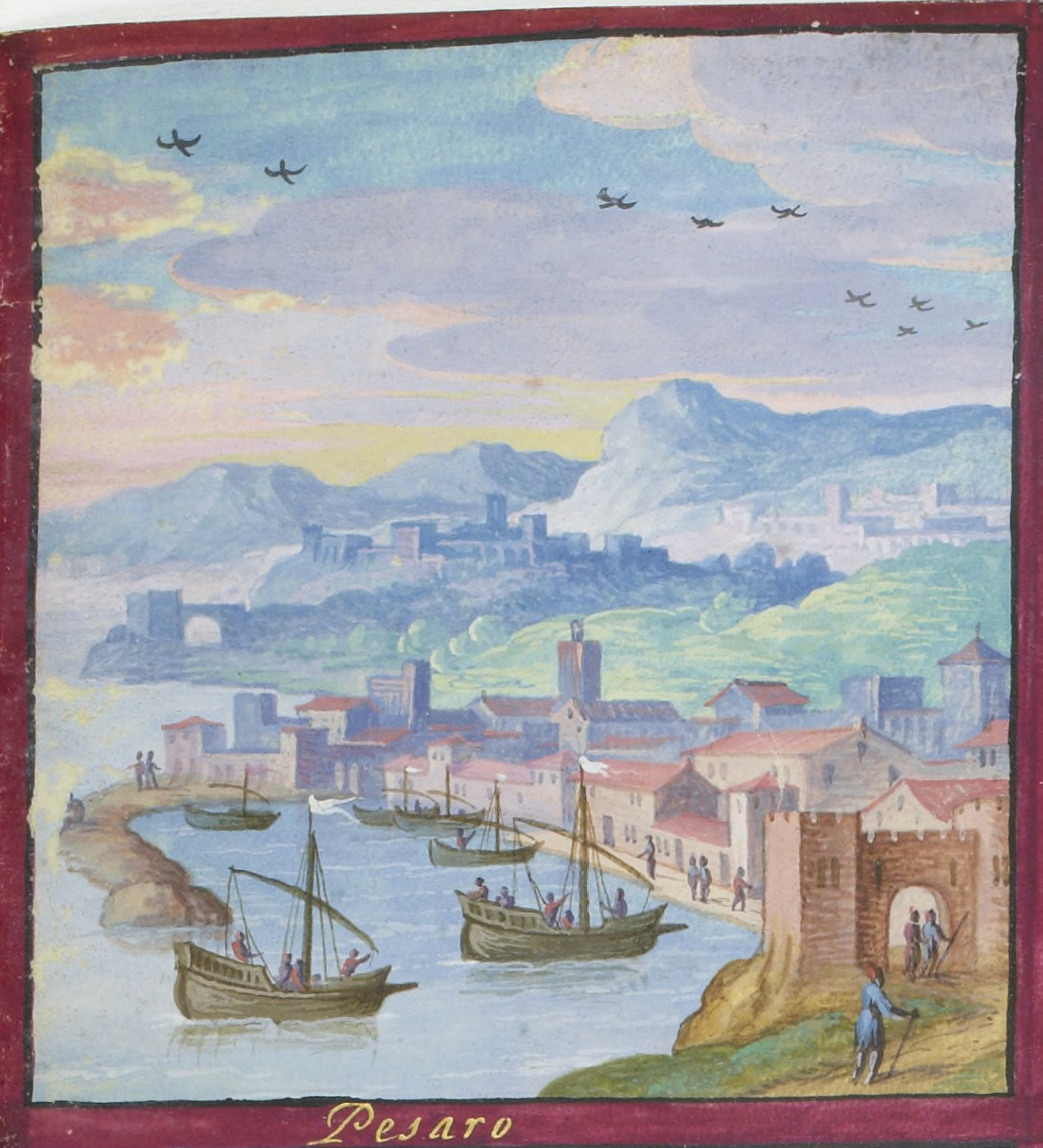 Voyages et aventures de Ch. Magius, Bibliothèque nationale de France, département Estampes et photographie, RESERVE 4-AD-134, detail de la miniature no. 9; port et ville de Pesaro